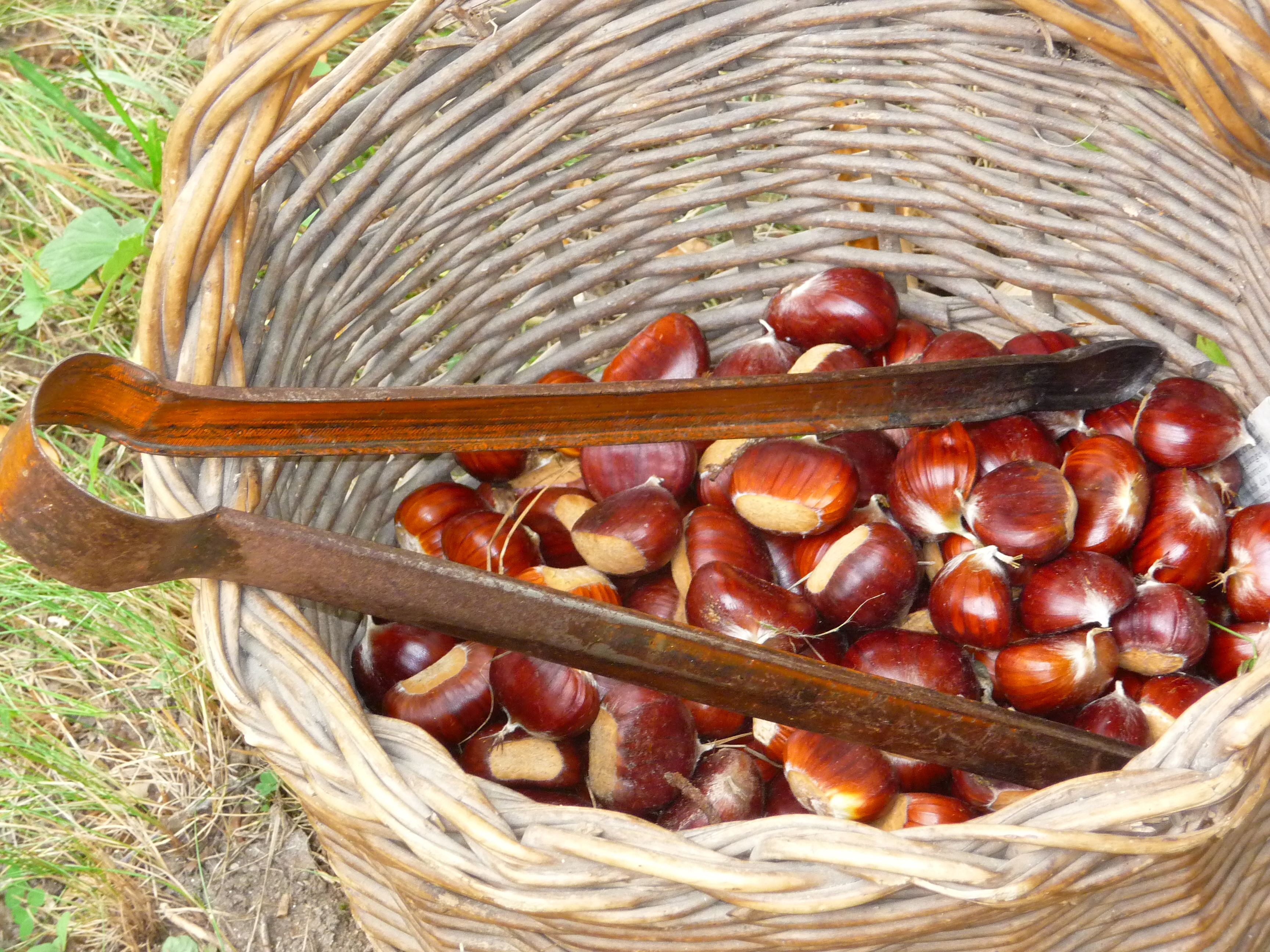 Borgata Pognant (San Giorio di Susa) Marroni della Val di Susa (IGP).